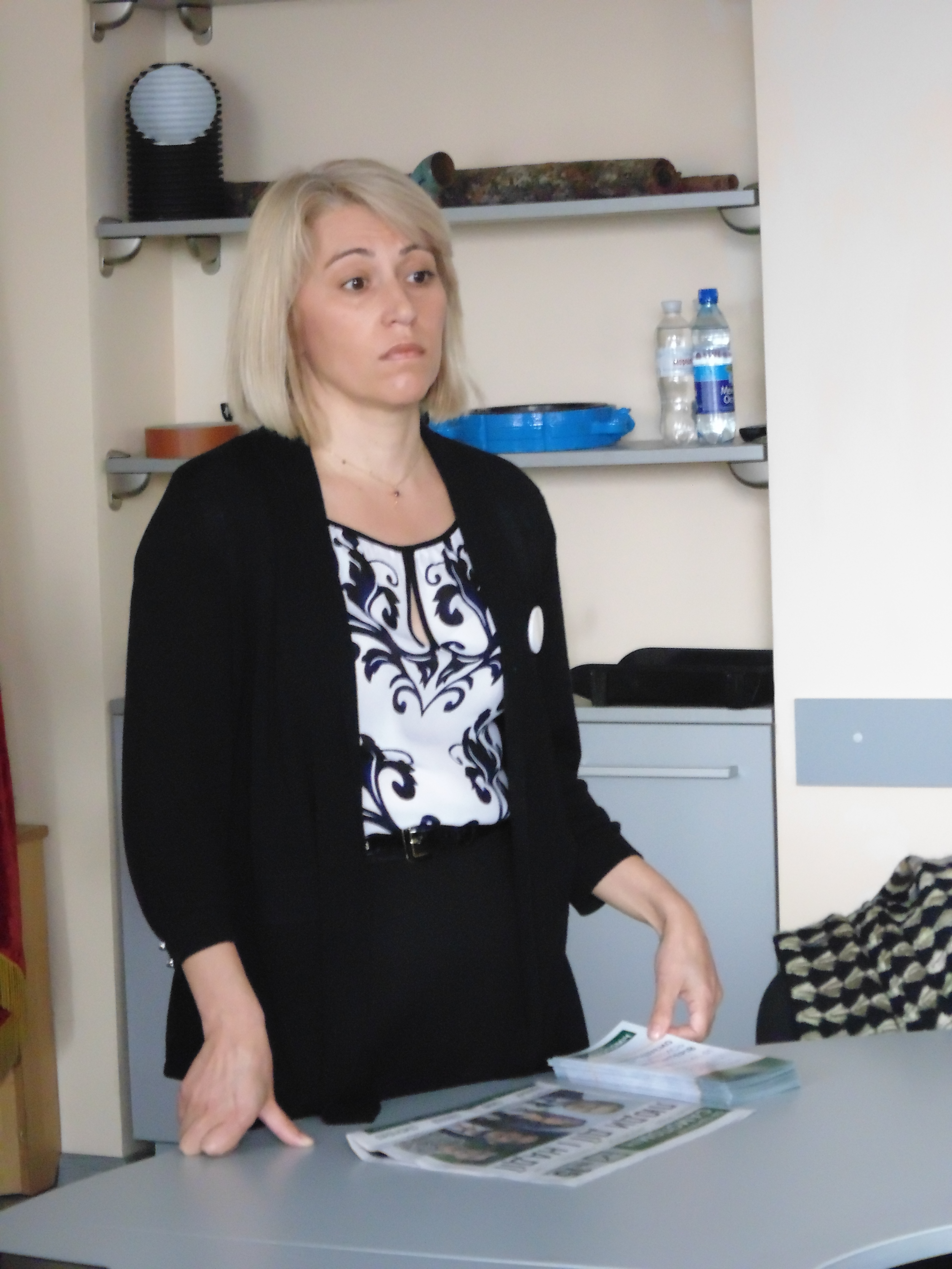 Бабак Альона Валеріївна, депутат ВРУ